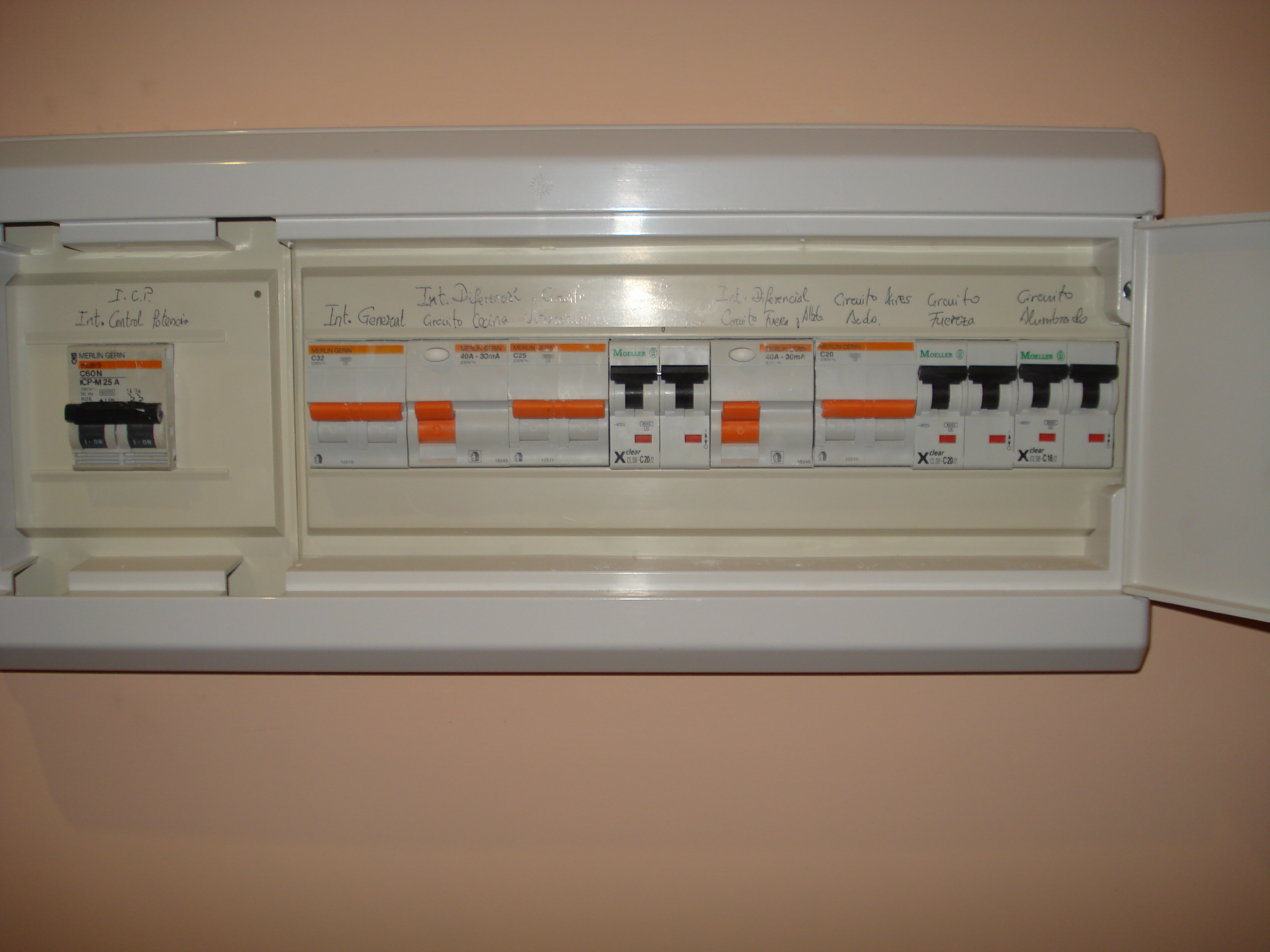 Cuadro de seguridad eléctrica en una vivienda